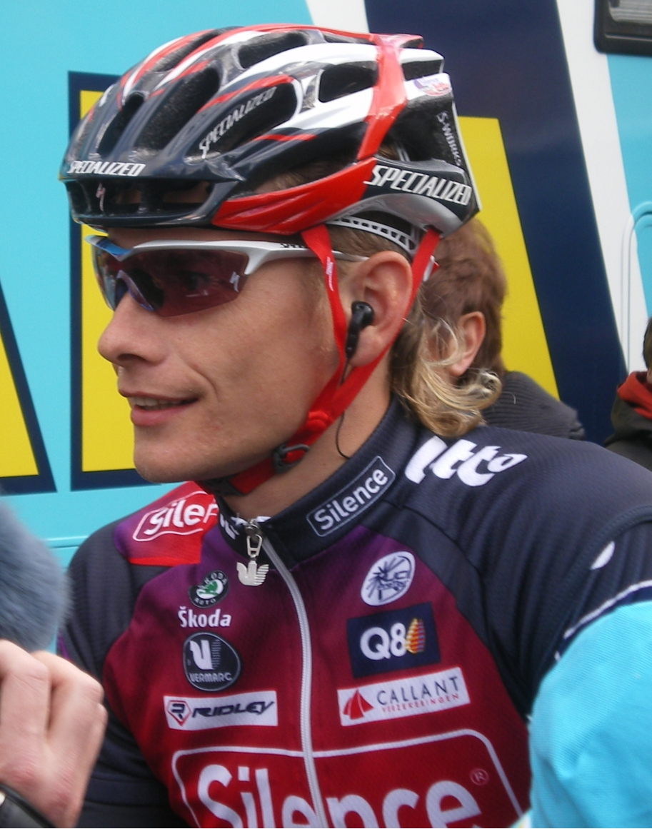 Gorik Gardeyn - Omloop Het Volk 2008